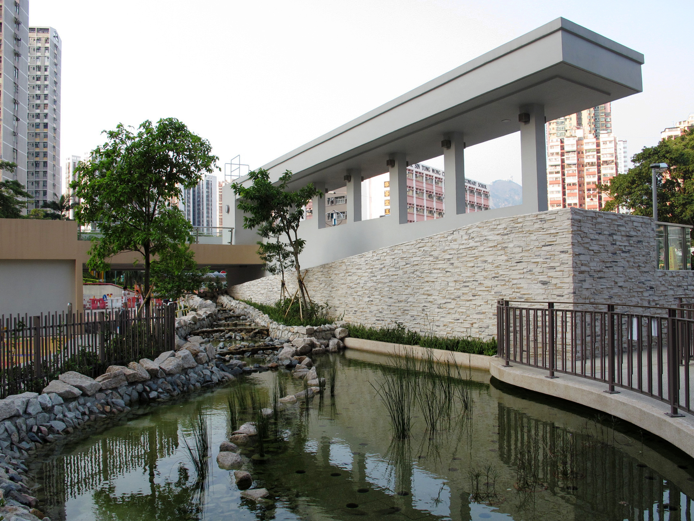 Tung Wui Estate Pond 2